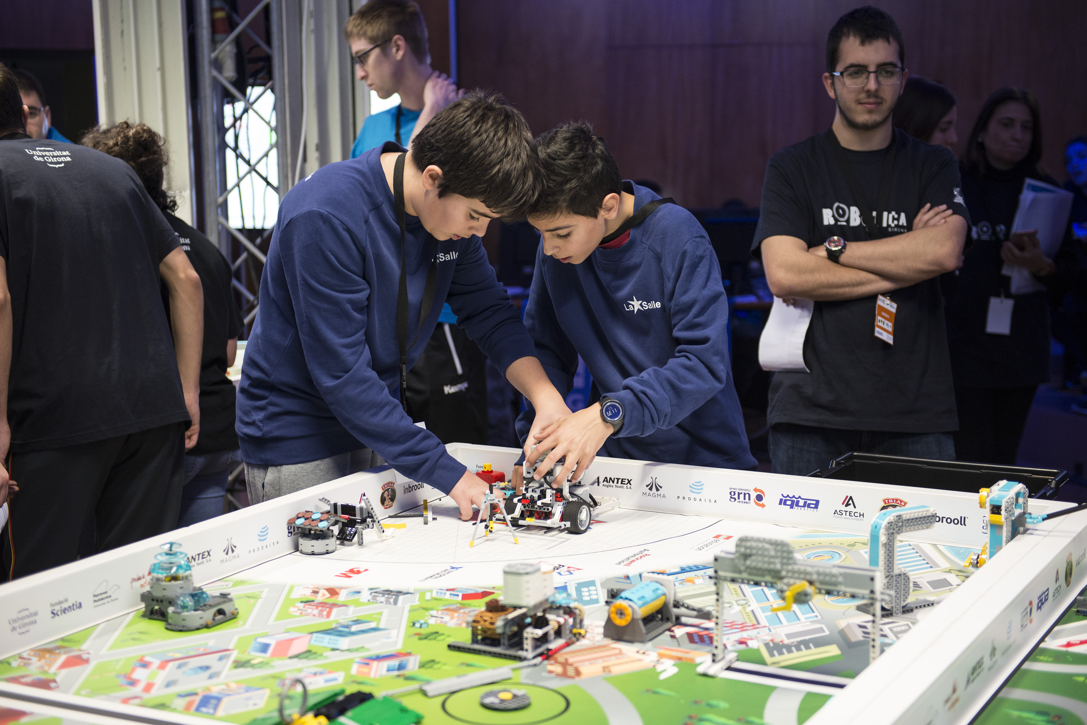 First Lego League, Escola Politècnica Superior, Universitat de Girona.